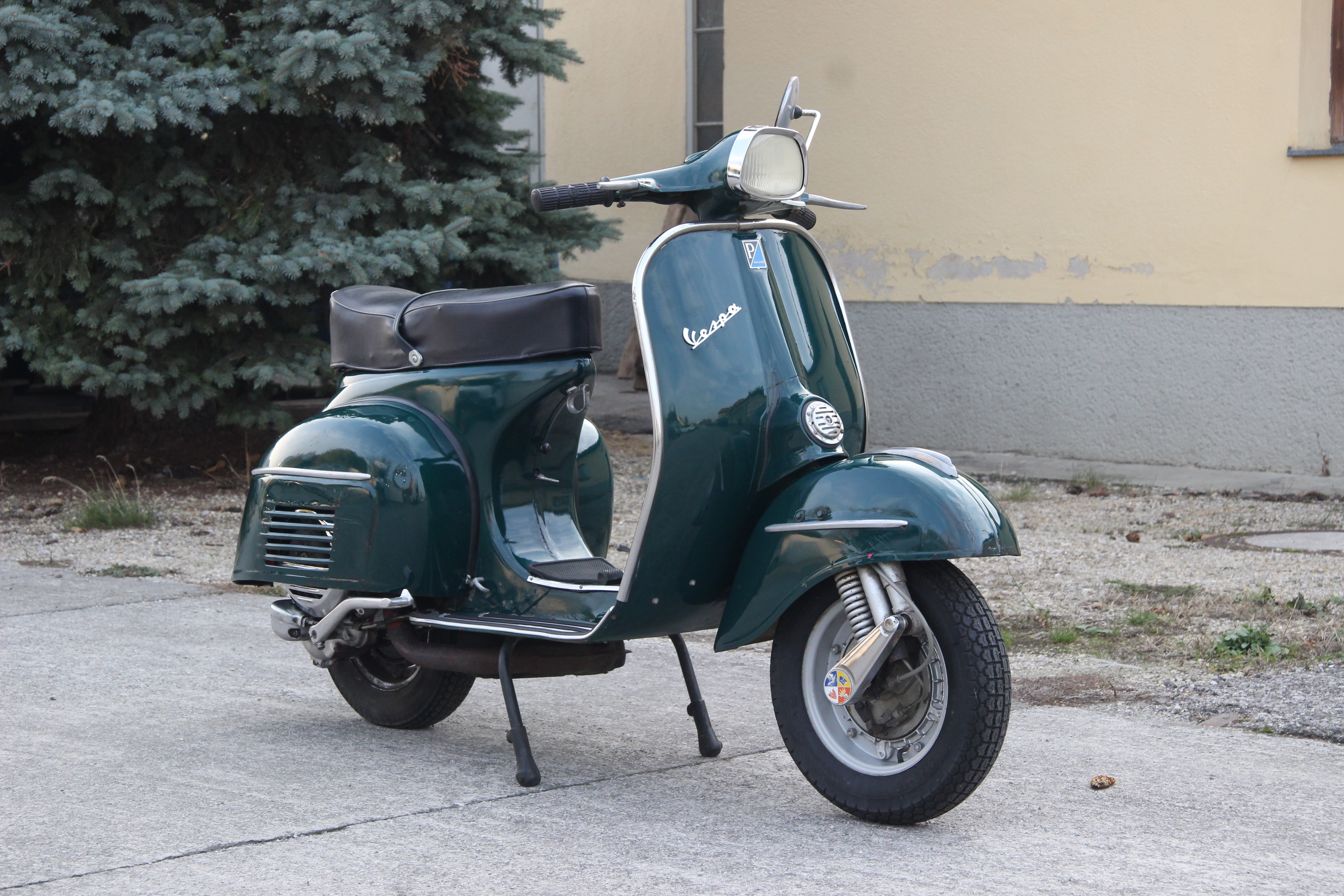 Vespa 150 SPRINT Originalzustand